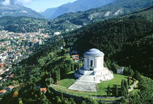 Rovereto, Ossario dei Caduti della Prima guerra mondiale